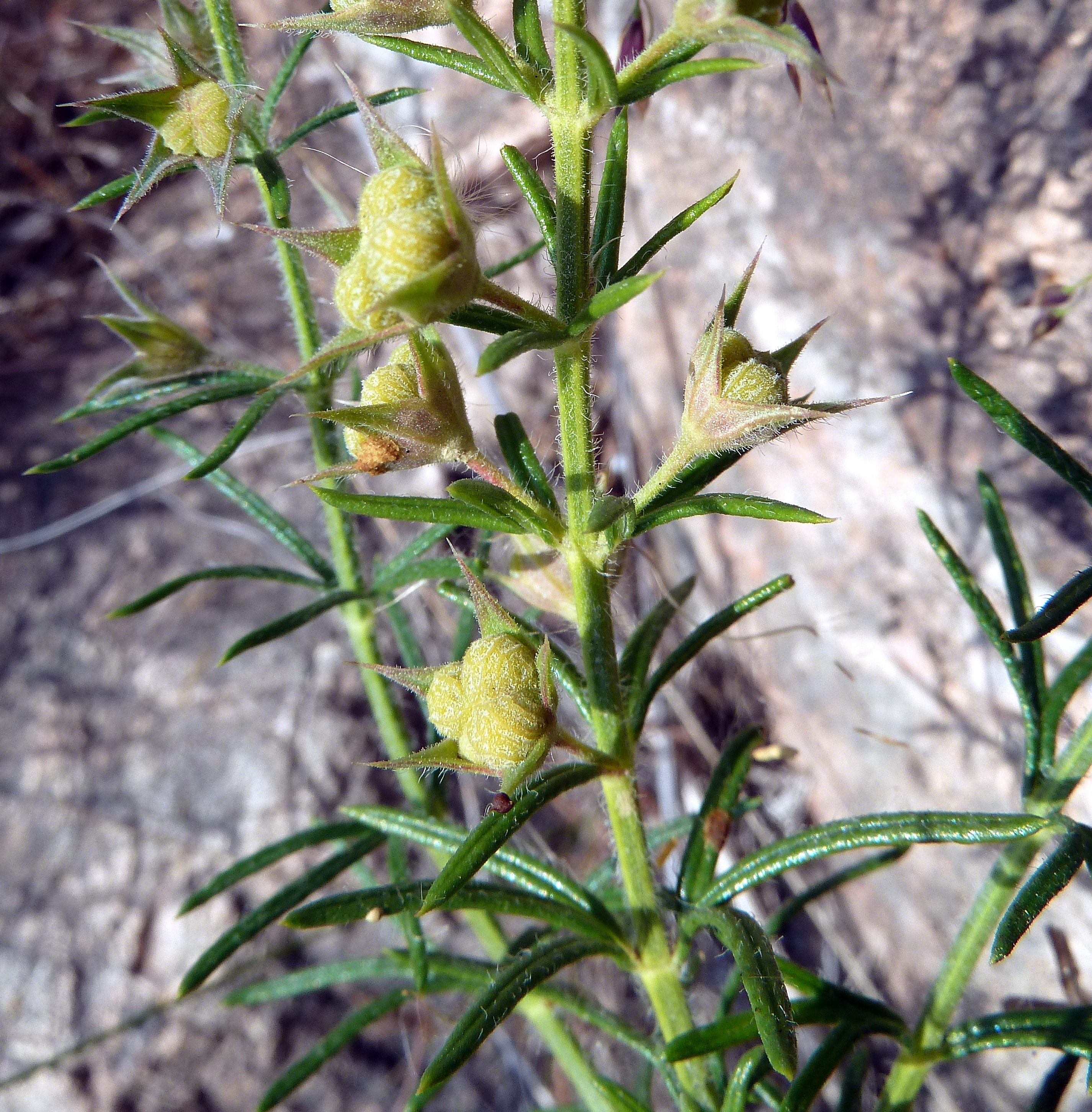 Teucrium pseudochamaepitys (Pinillo bastardo, Yerba de la Cruz) : Individuo en fructificación con las núculas aún inmaduras - Cabezo de las Fuentes/de los Ojales, Albatera (Alicante, España).